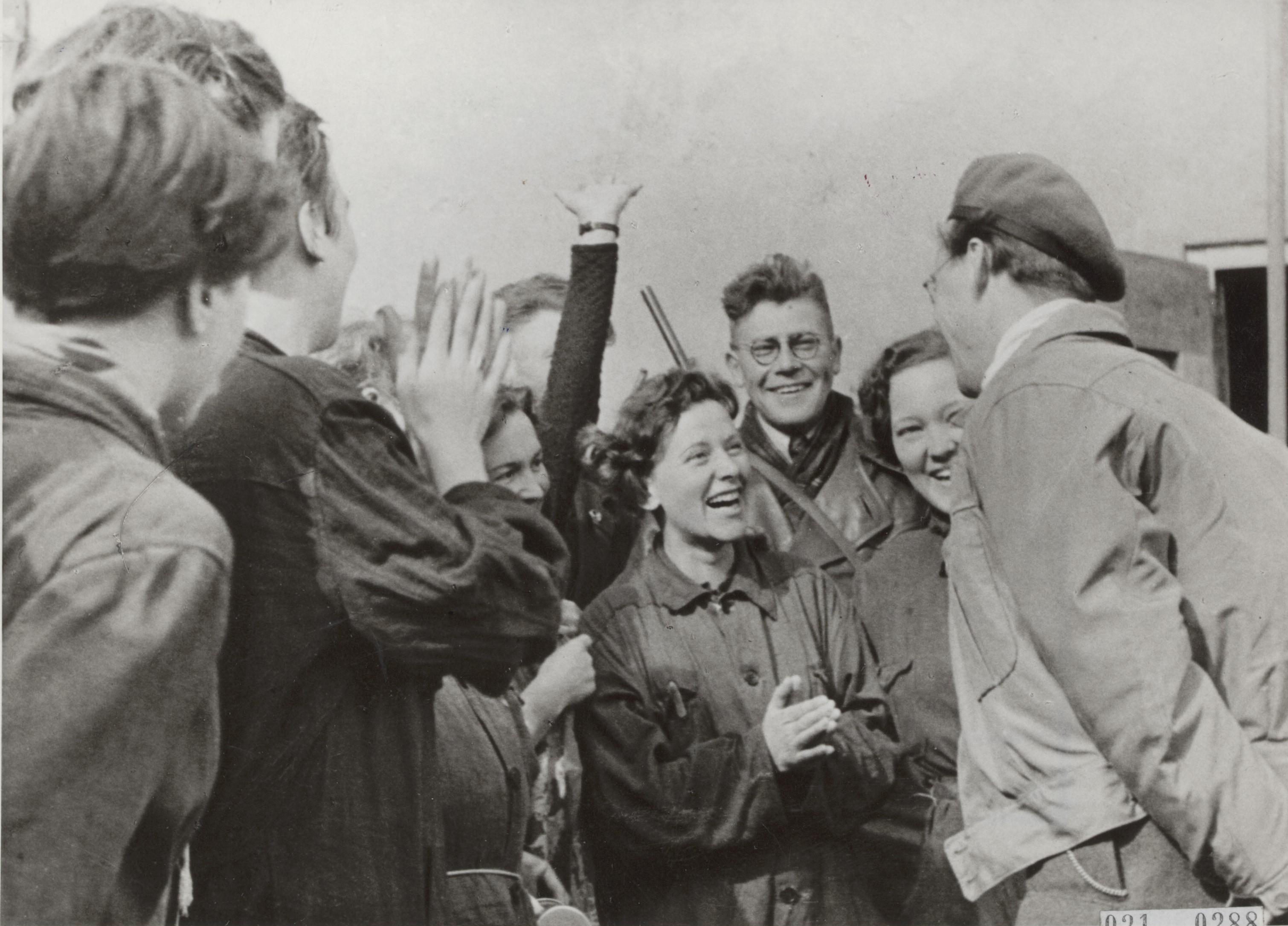 Prins Bernhard bij de bevrijding van kamp Westerbork